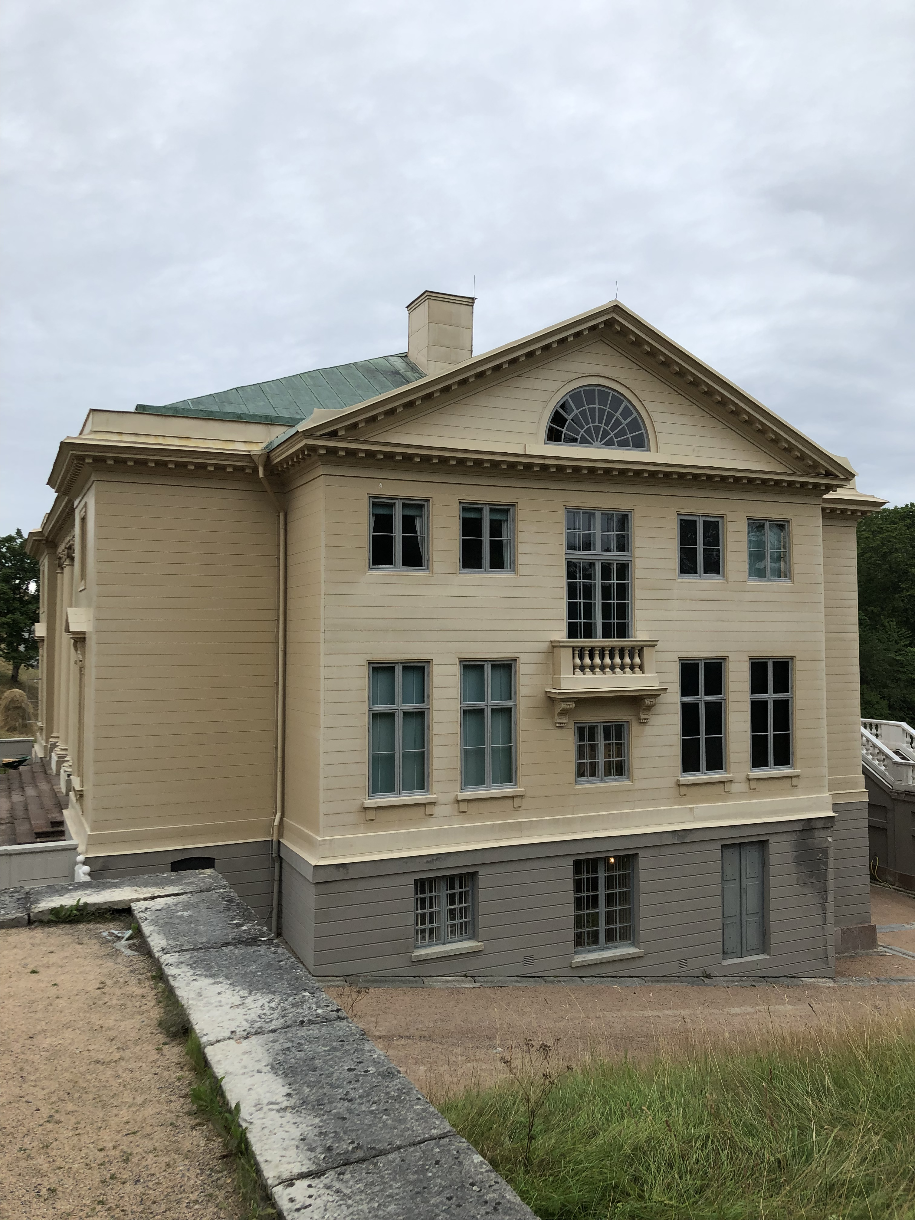 Västra fasaden av Gunnebo slott, bild tagen den 31 juli 2019.